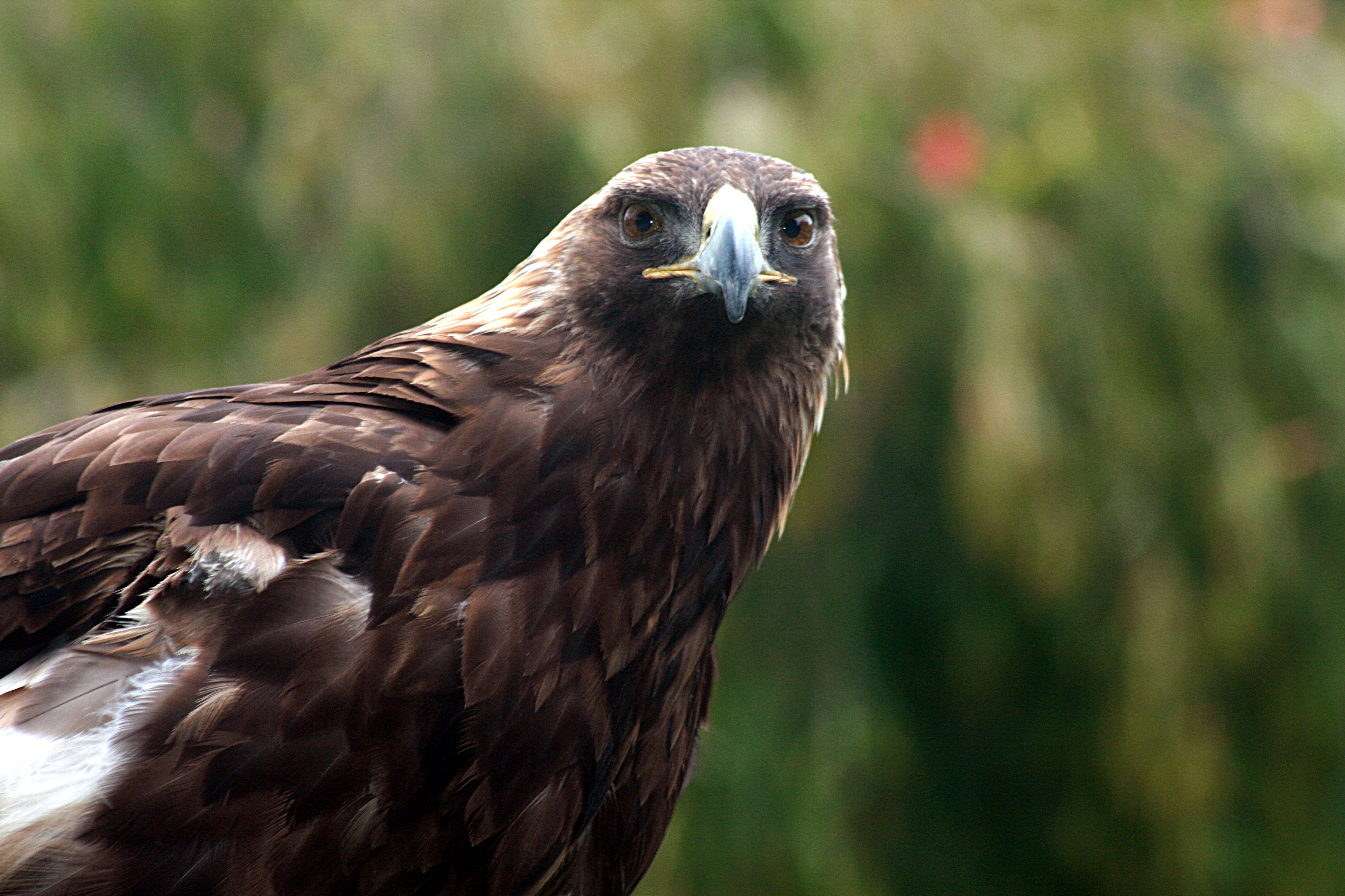 Golden Eagle